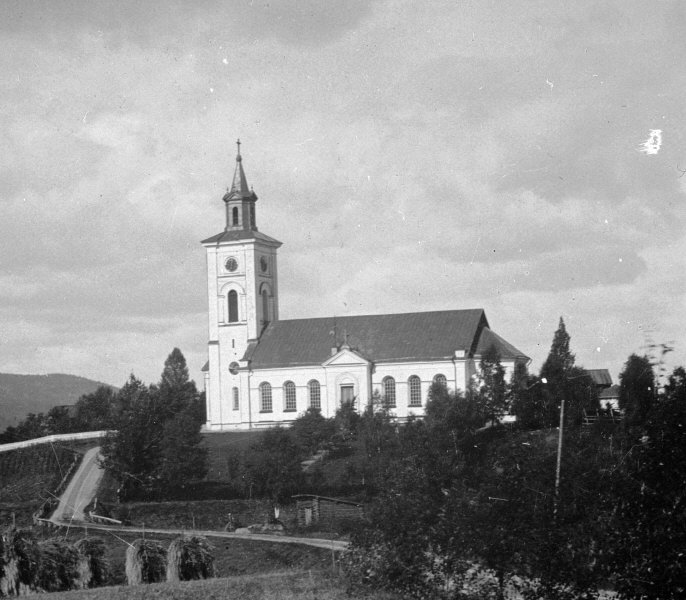 Kyrkan från söder med omgivningar. Kategori: (01) ExteriörerKyrkan från söder med omgivningar.